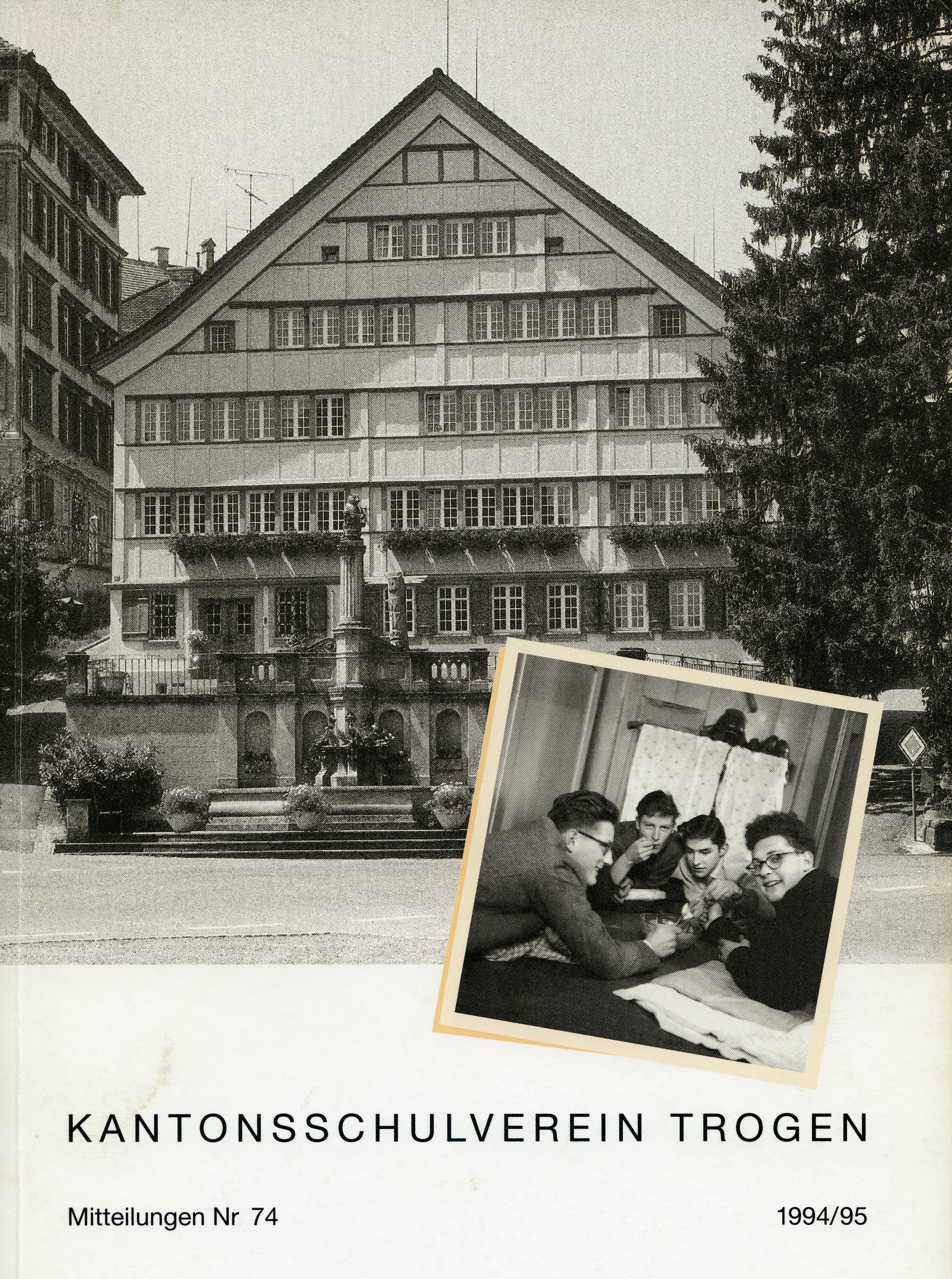 Titelbild der KVT-Mitteilungen Nr. 74 (1995): Mädchenkonvikt am Landsgemeindeplatz Trogen (ehem. Pension Hunziker/Ess). Foto von Emanuel Sturzenegger